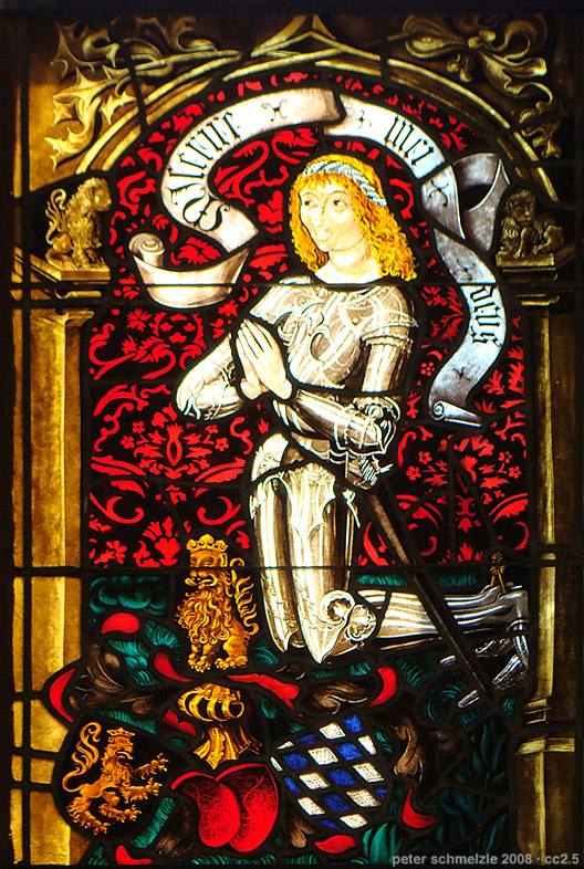 Darstellung des Pfalzgrafen Philipp der Aufrichtige von 1483 in der evang. Kirche in Neckarsteinach